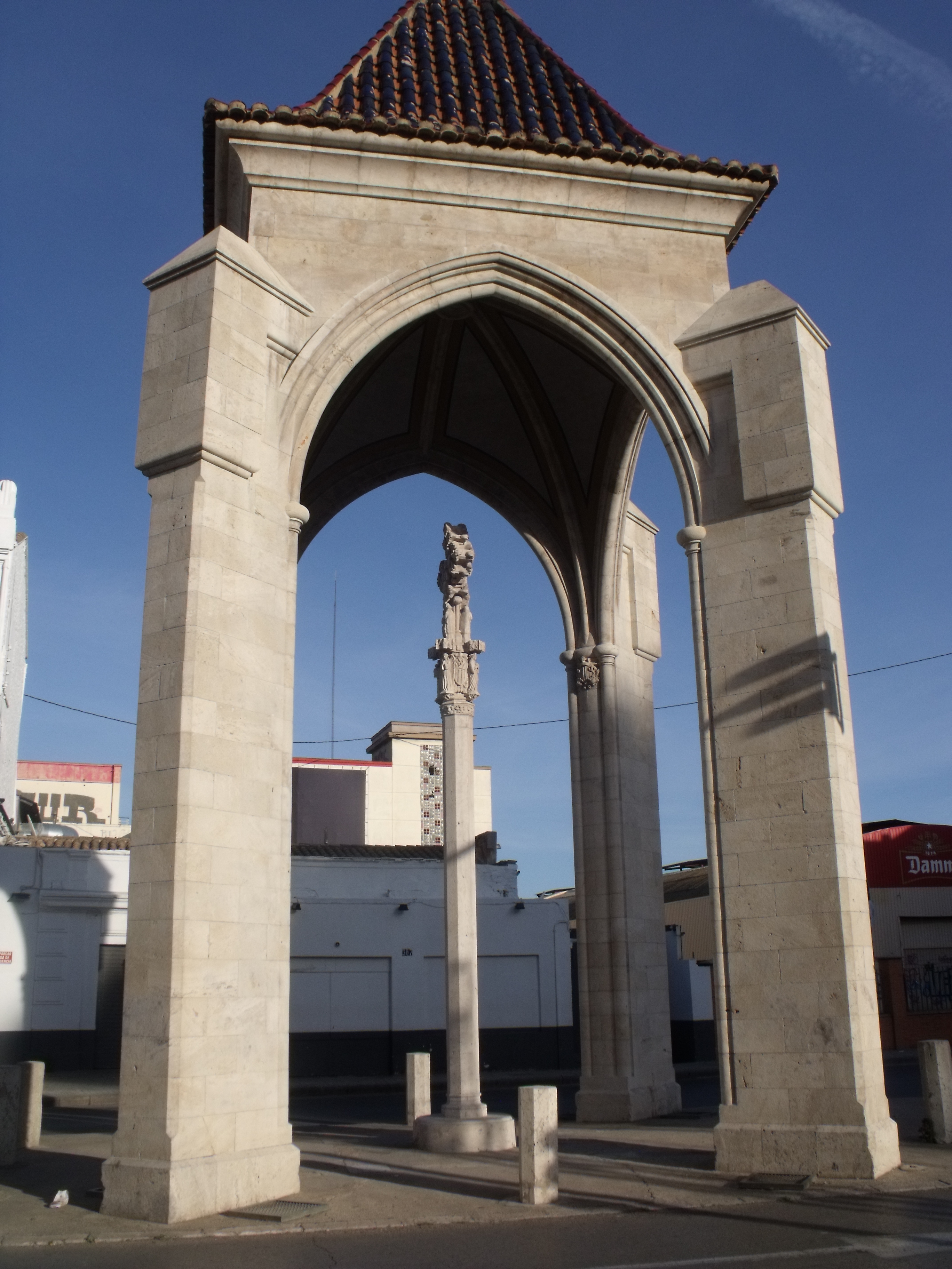 Cruz cubierta de la calle de San Vicente Mártir.